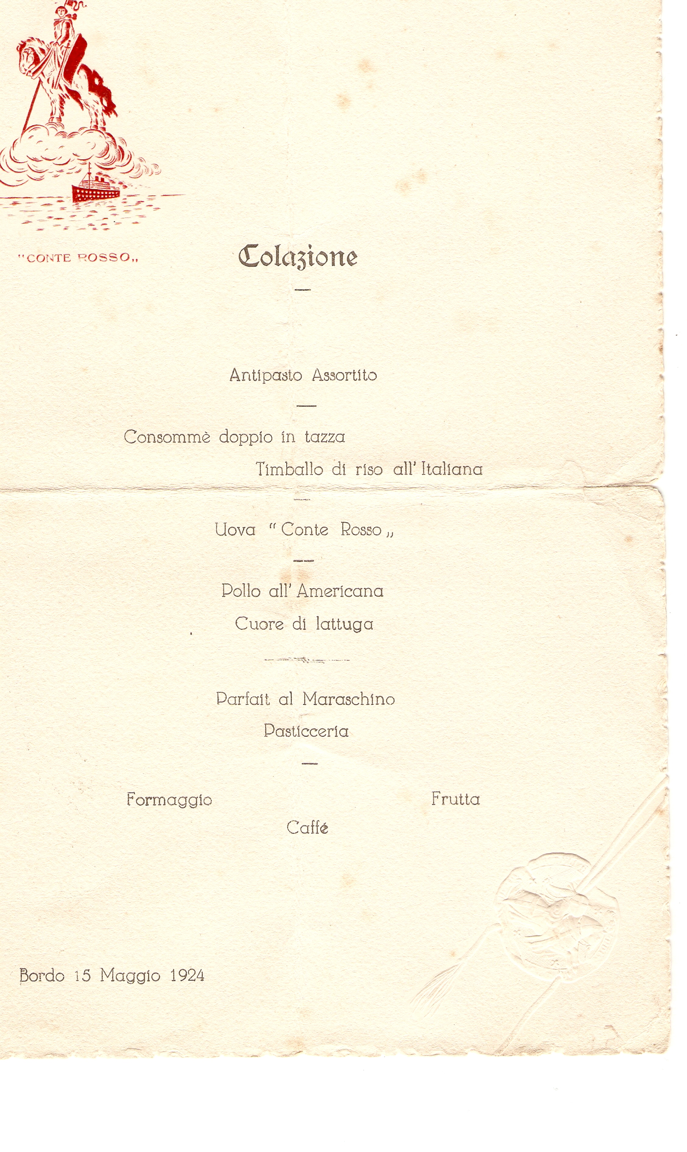 Meu' di bordo del 15 maggio 1924 Opera propria Autore = Carlousa